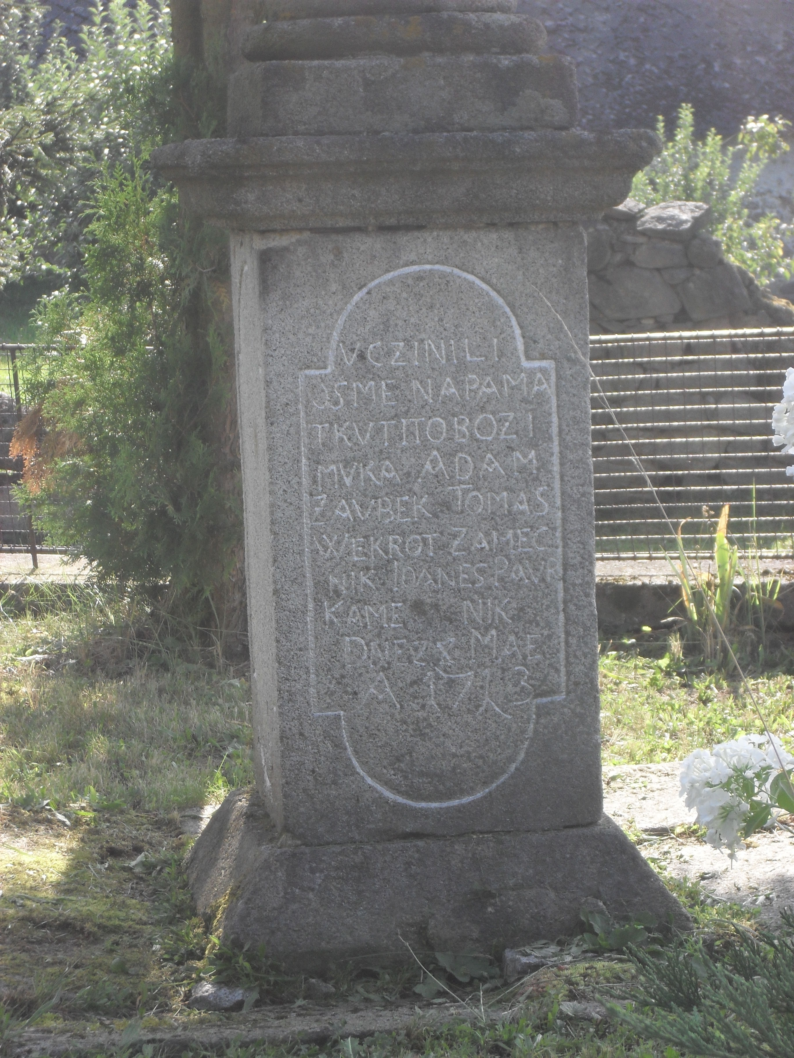 Fotografie pořízena v obci Maňovice.